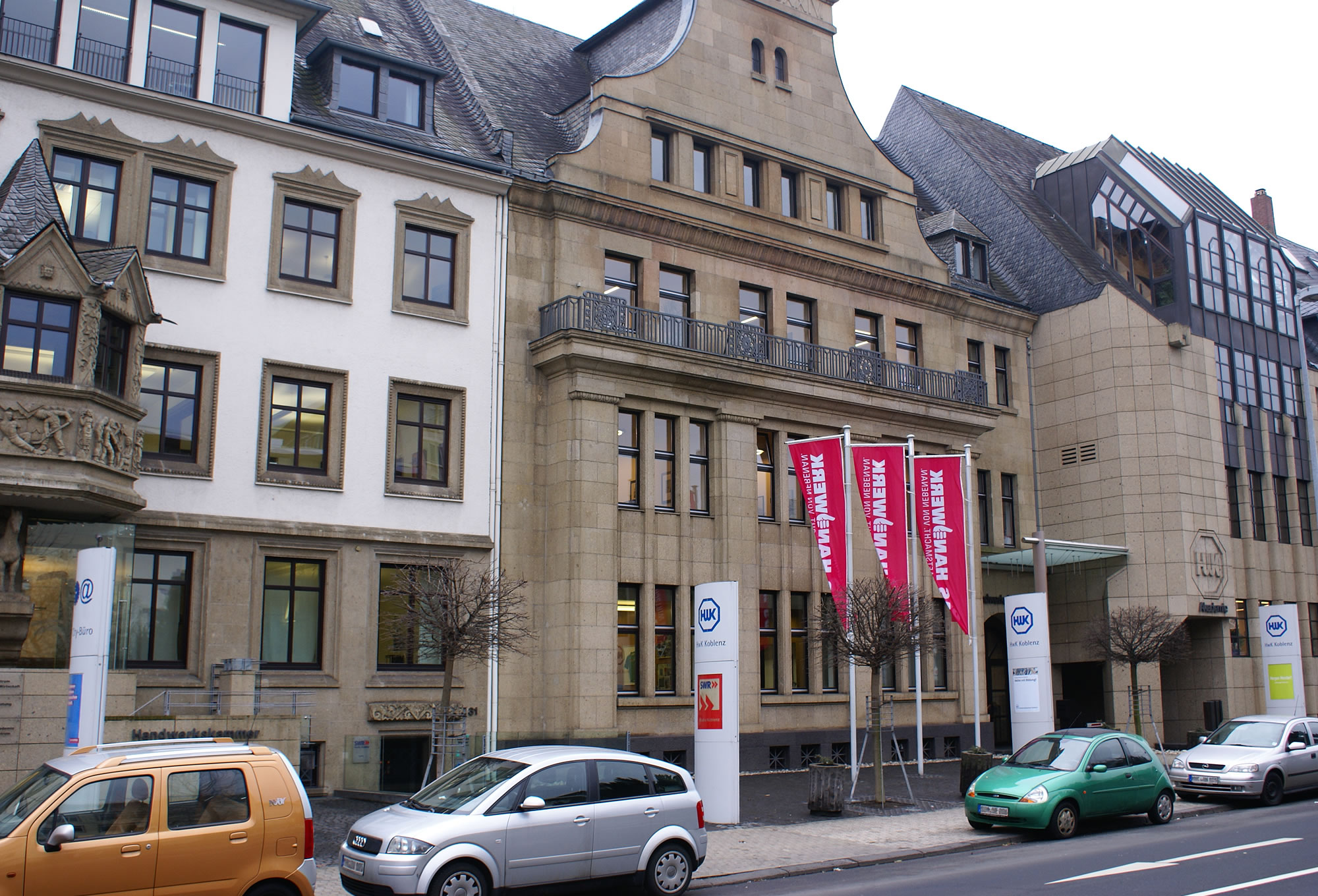 Die Verwaltungszentrale der Handwerkskammer Koblenz mit dem HwK-City-Bür und der Akademie-Handwerk